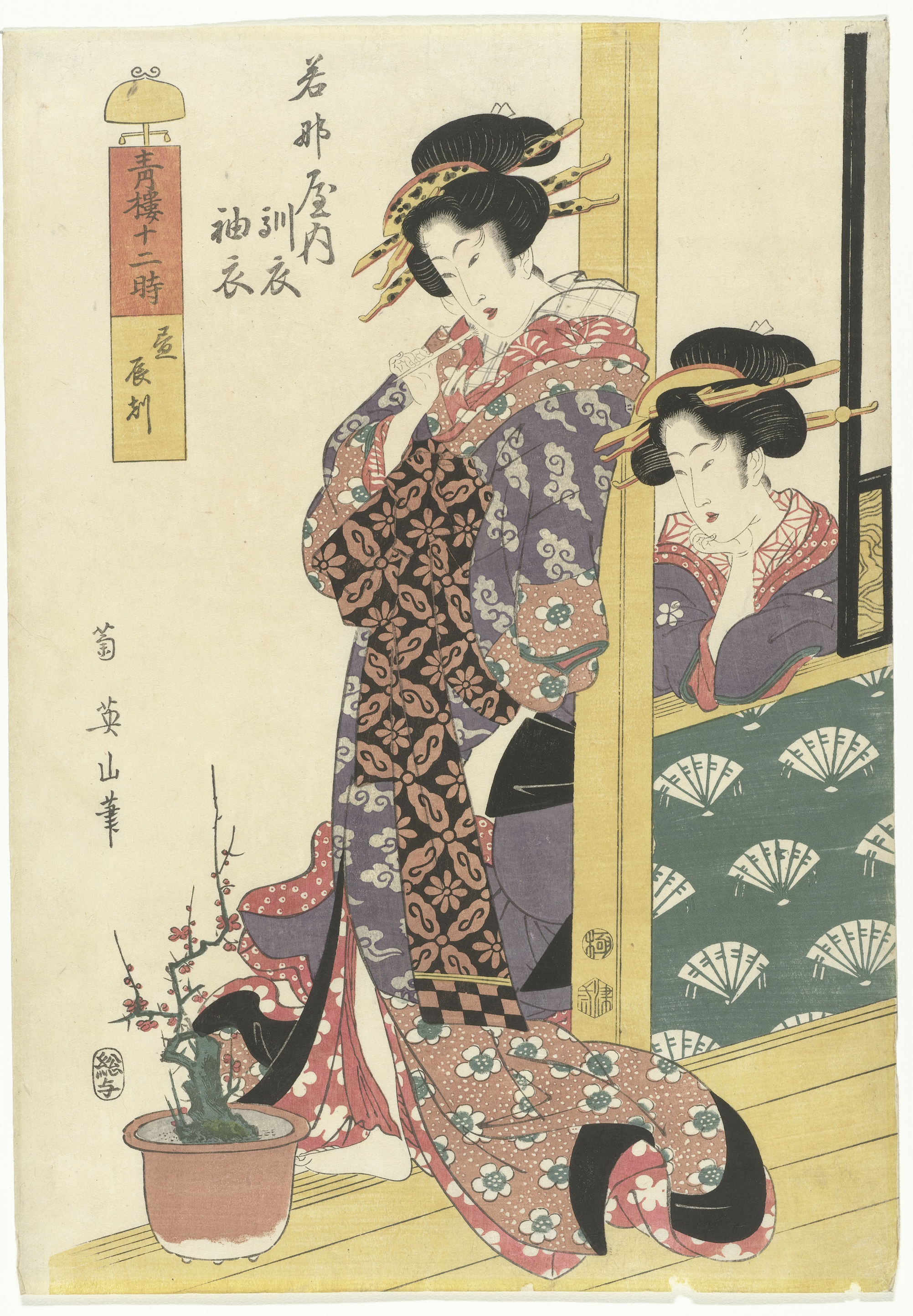 Twee courtisanes; één staand, de ander door schuifraam leunend, kijkend naar bonsai boompje in pot. Label Line: mentioned on object Kikugawa Eizan (1787 - 1867), in of na ca. 1800 - in of voor 1842, kleurenhoutsnede; lijnblok in zwar tmet kleurblokken Collection: prenten; Japan (collectie)